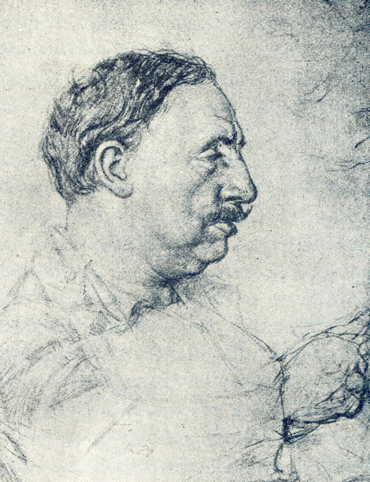 autore Vincenzo Gemito (morto nel 1929), riproduzione da stampa d'epoca, ritratto di Edoardo Scarfoglio, opera il cui autore è morto da più di 70 anni, acquisita da scanner